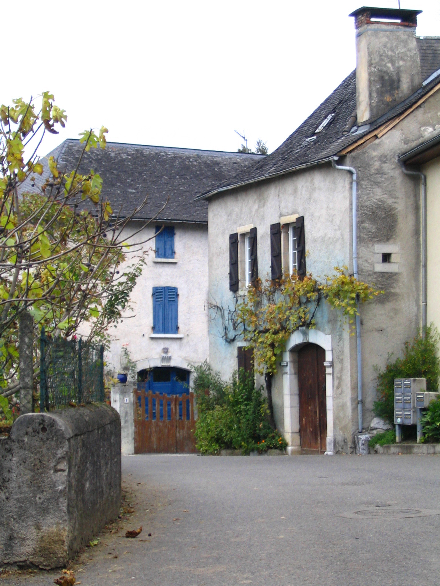 Village de Castet - Pyrénées Atlantiques - France